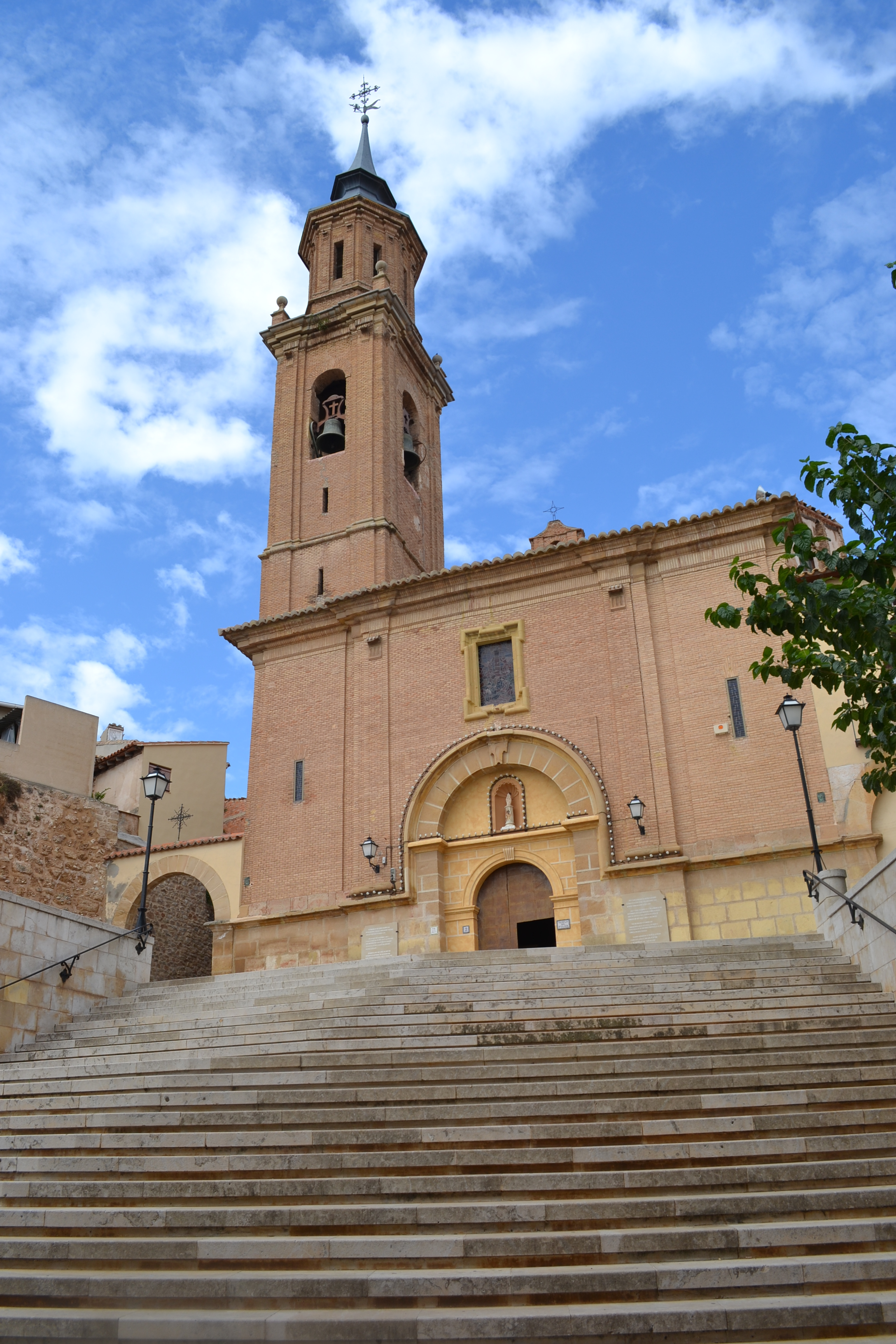 escalinata y fachada